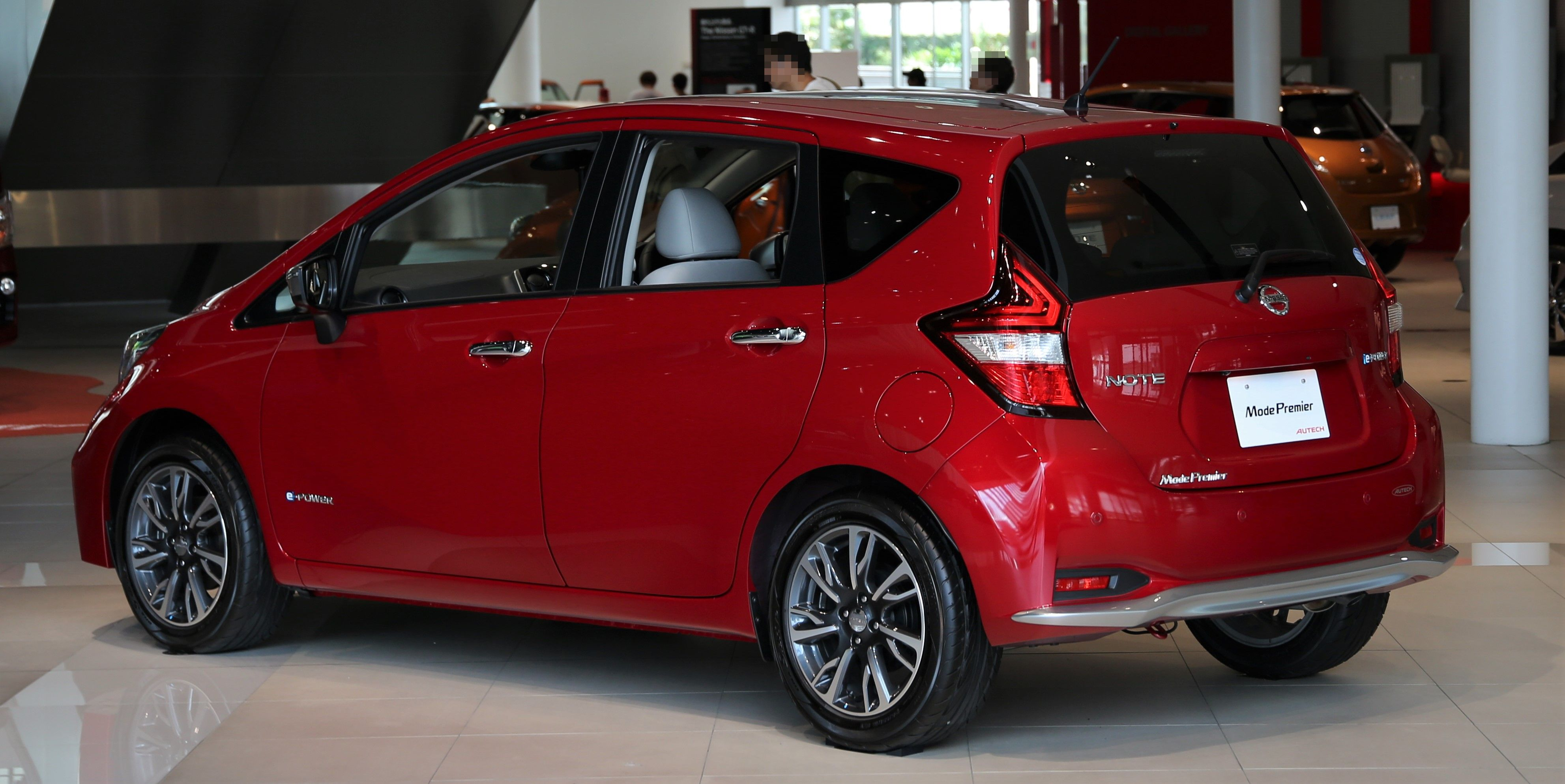 Nissan Note e-POWER